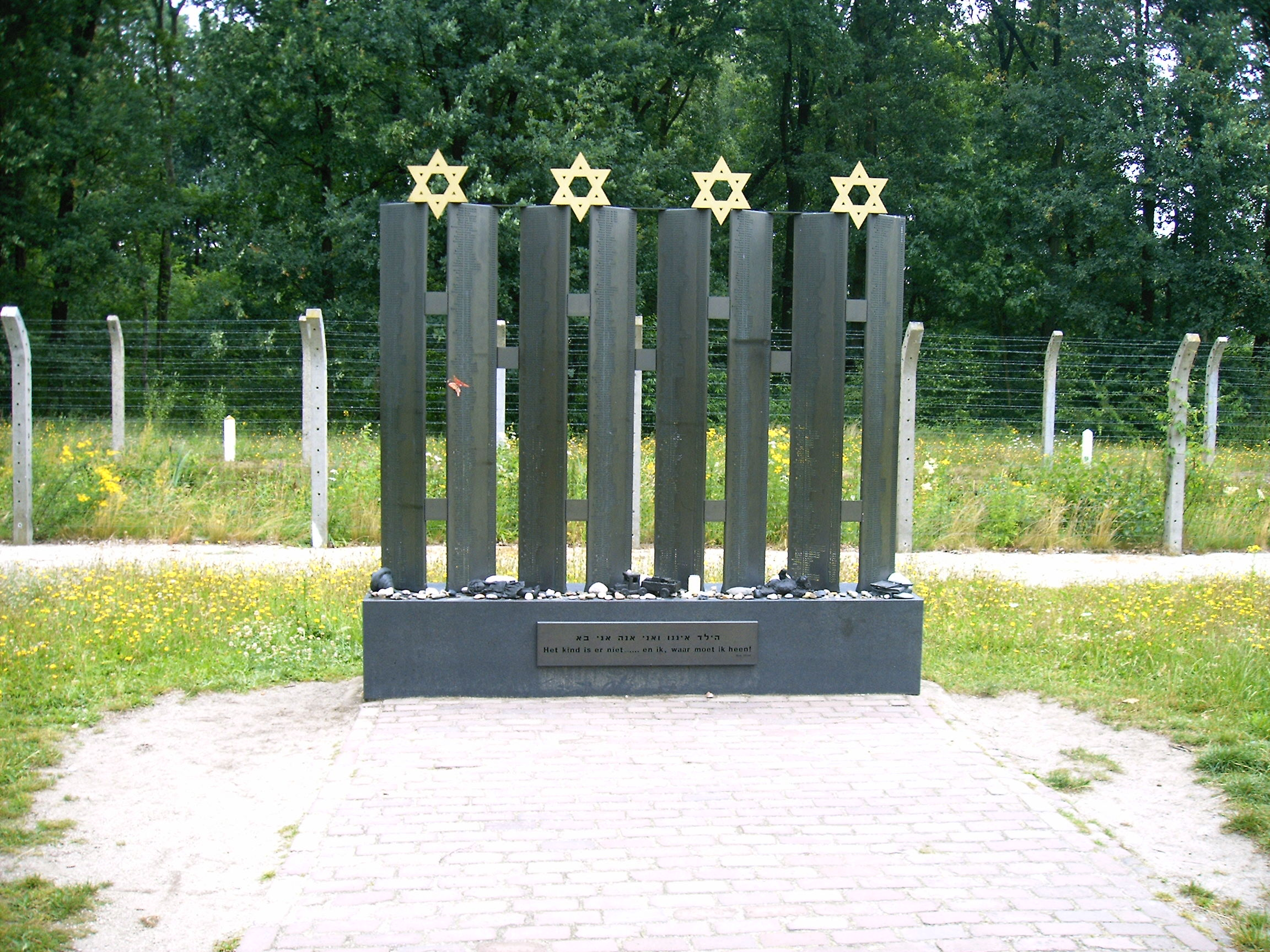 Monument der verloren kinderen, Algemeen aanzicht